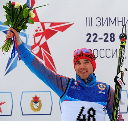 Алексей Александрович Червоткин (род. 1995) — российский лыжник